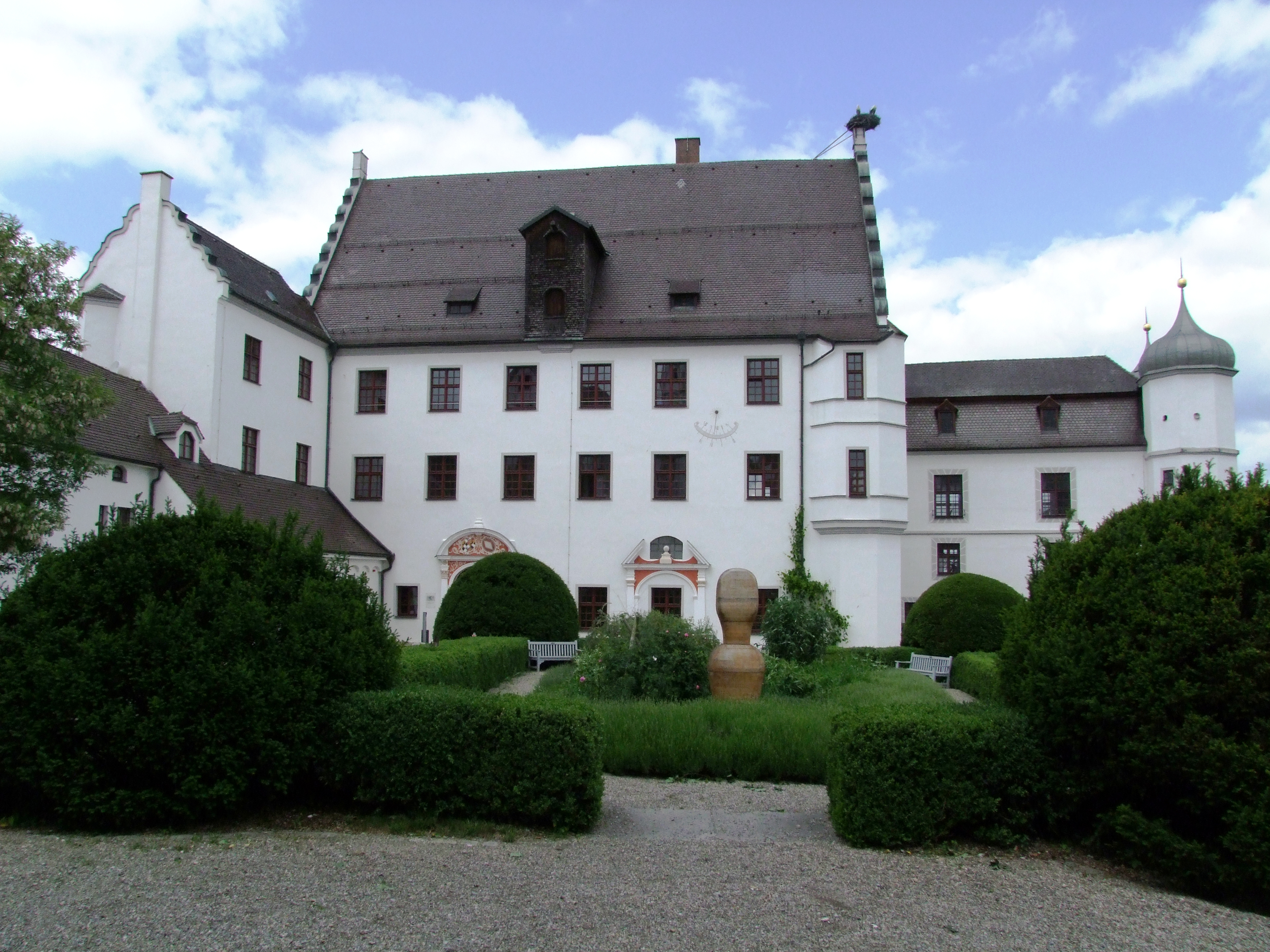 Vöhlinschloß in Illertissen Hauptgebäude des Schlosses